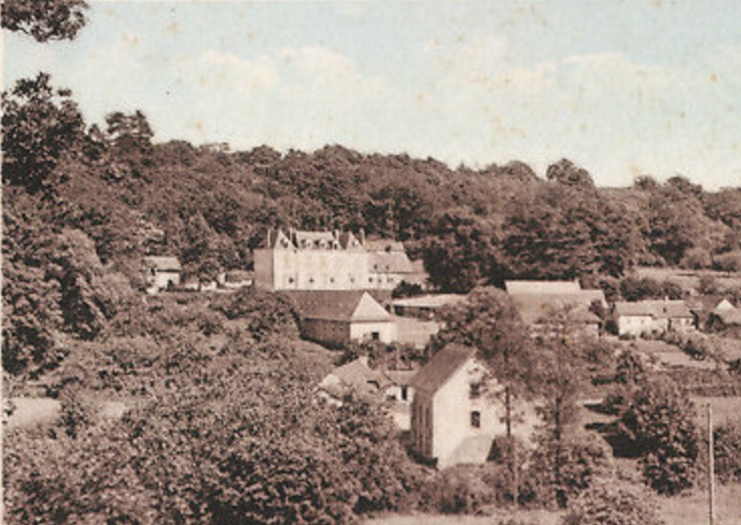 Le château de Thuboeuf (Nuillé-sur-vicoin) vers 1900